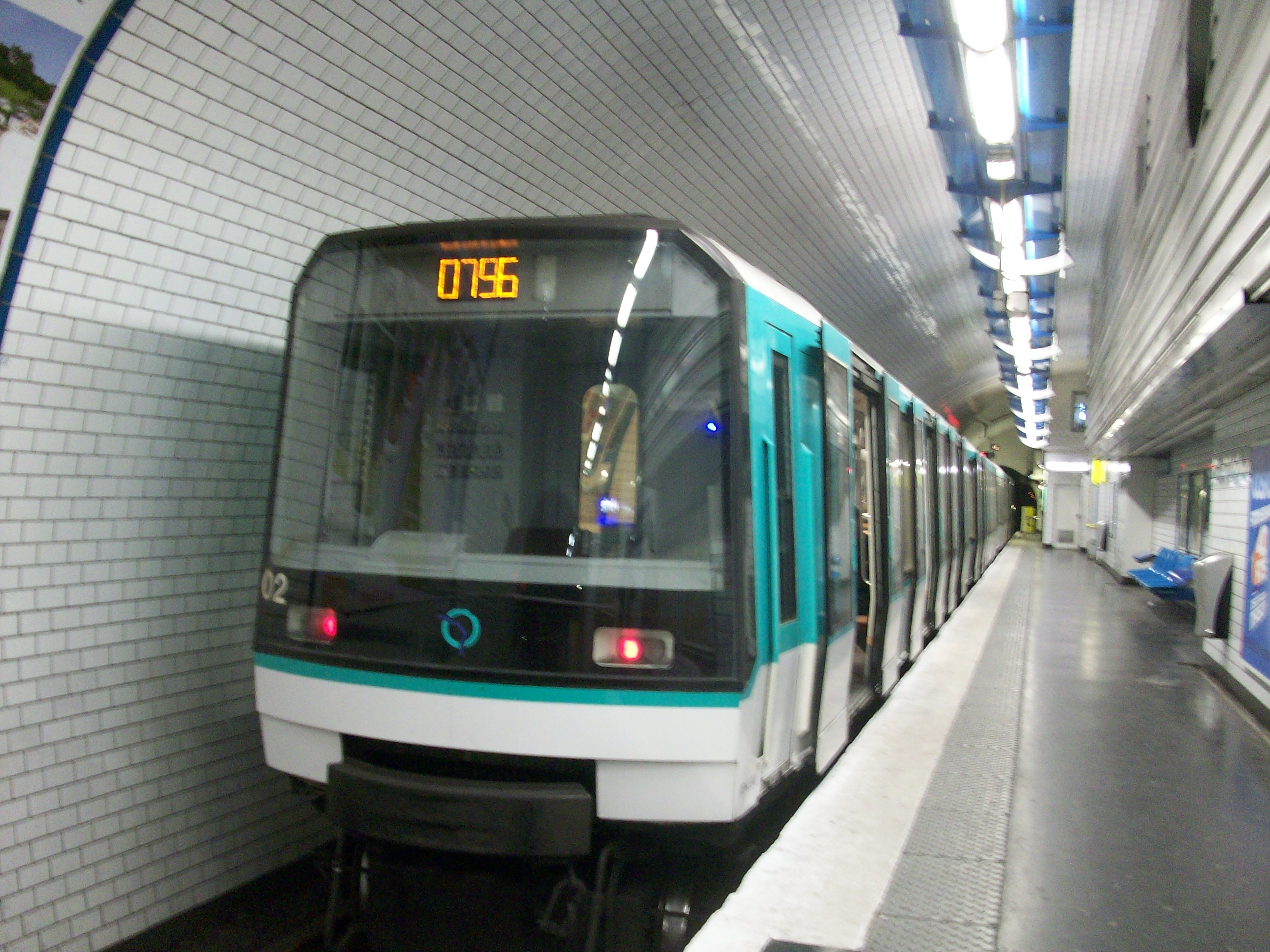 Une MF 88 du métro parisien